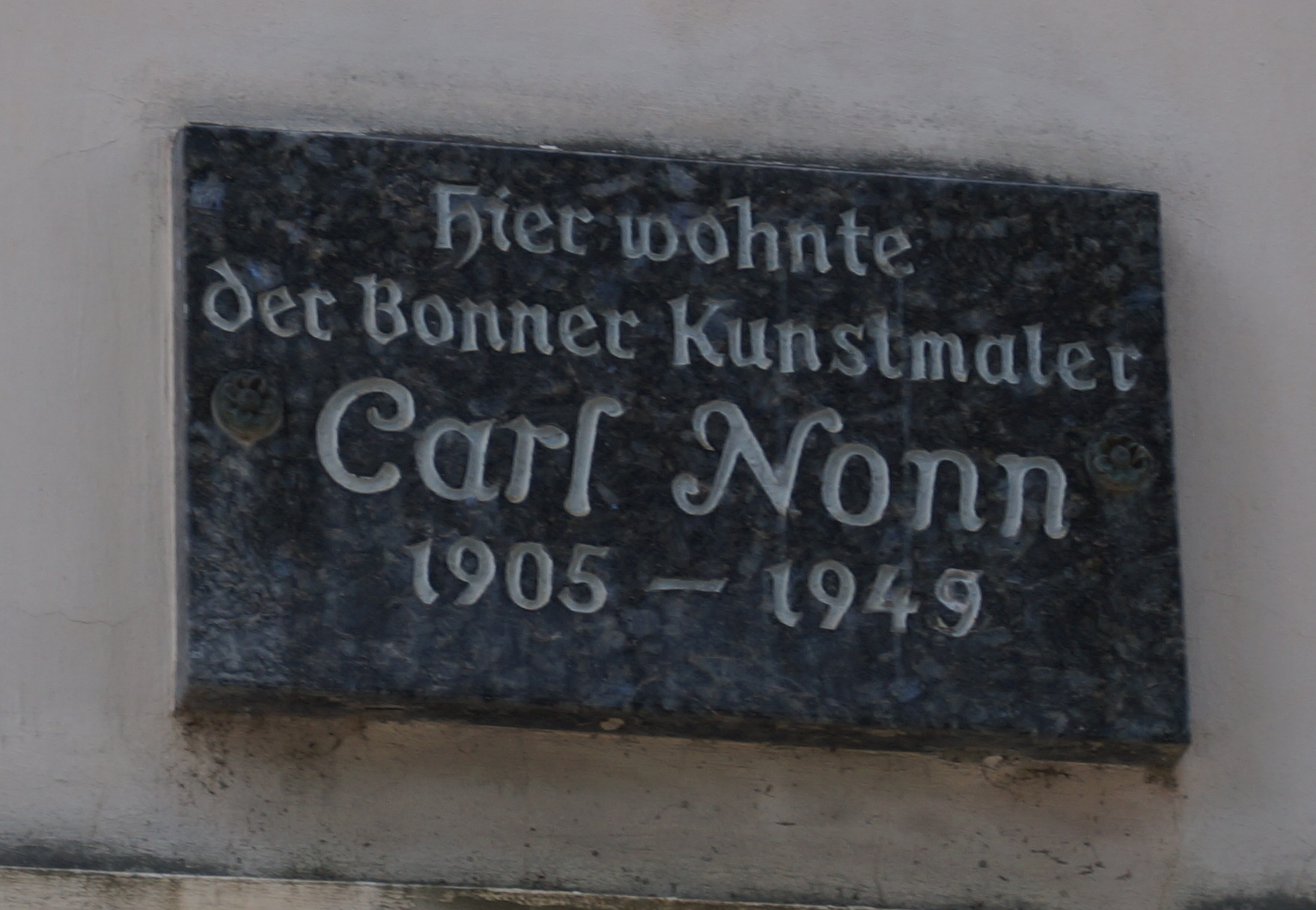 Gedenktafel für Carl Nonn an der Fassade des Hauses Niebuhrstr. 14 in Bonn.